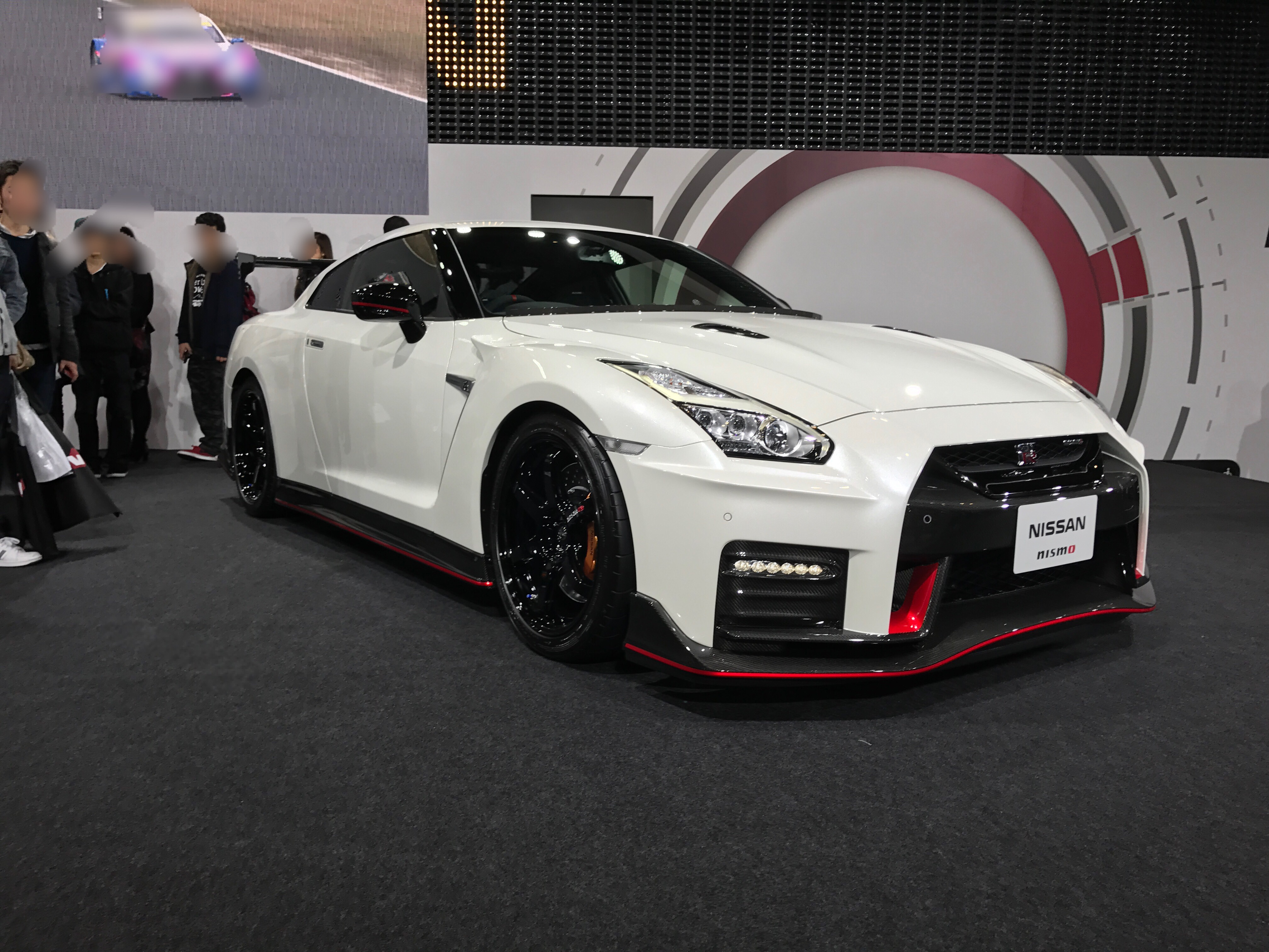 GT-Rニスモ2017年